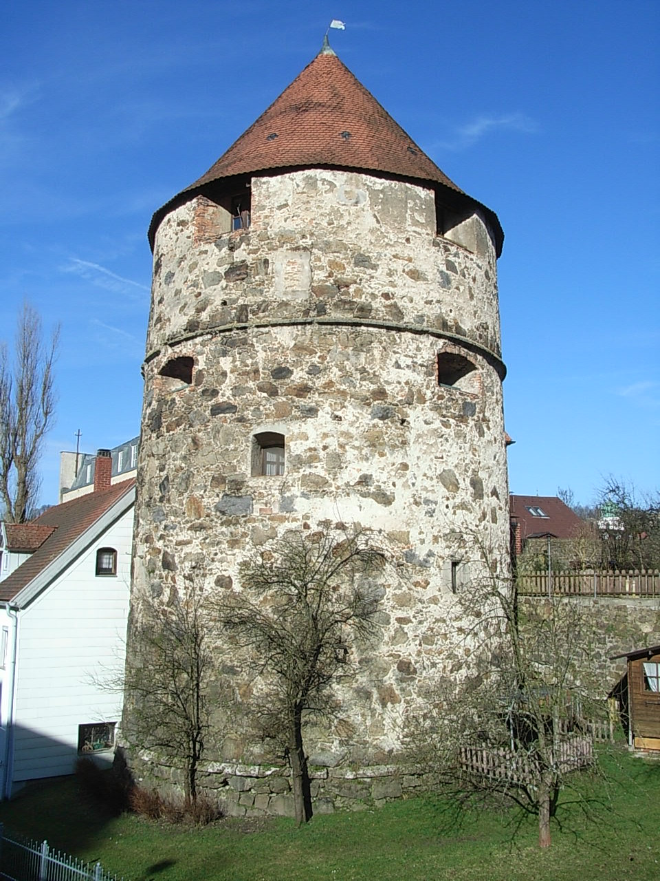 Peichterturm